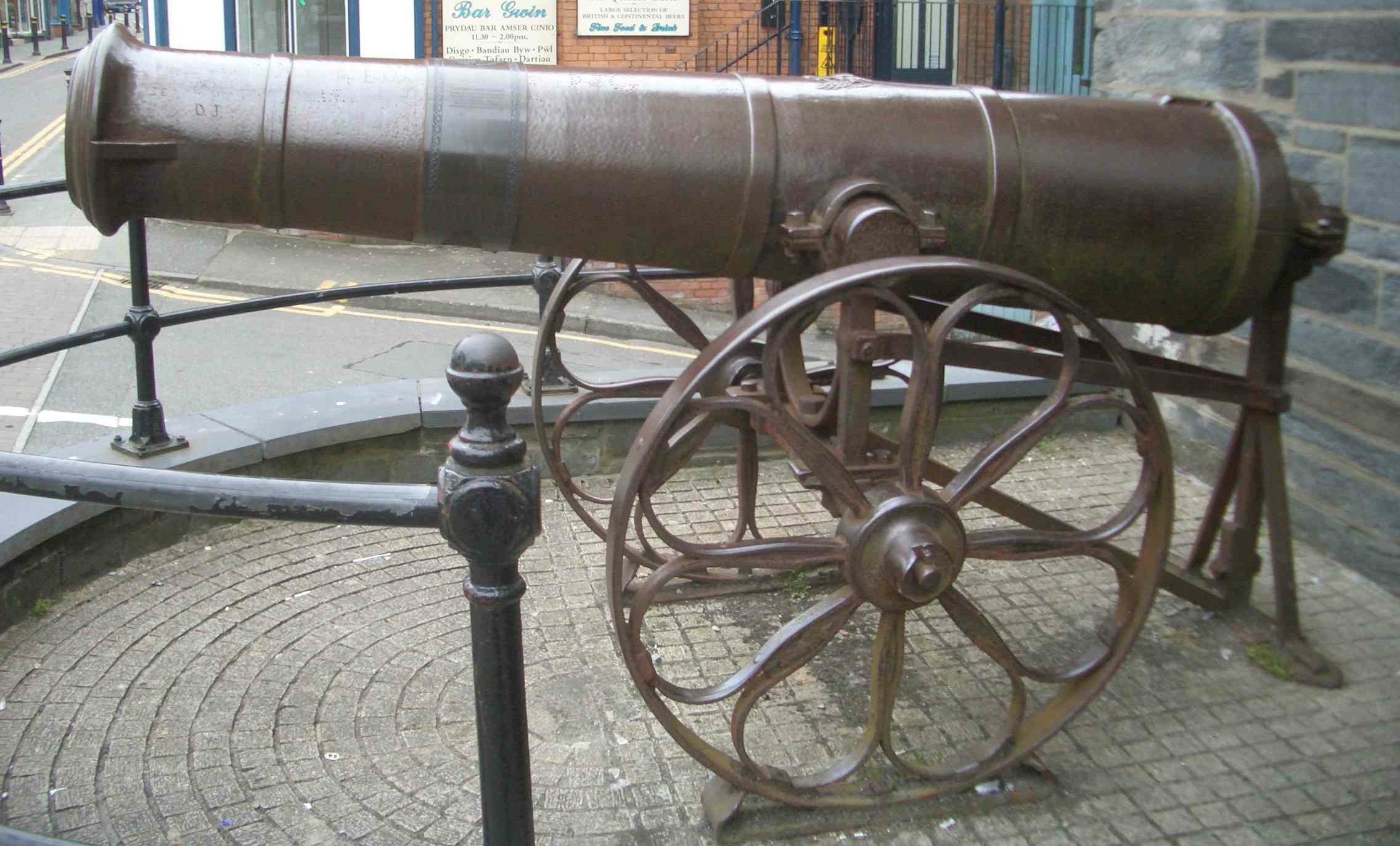 Beutekanone aus dem Krimkrieg vor der Markthalle von Cardigan, Wales.